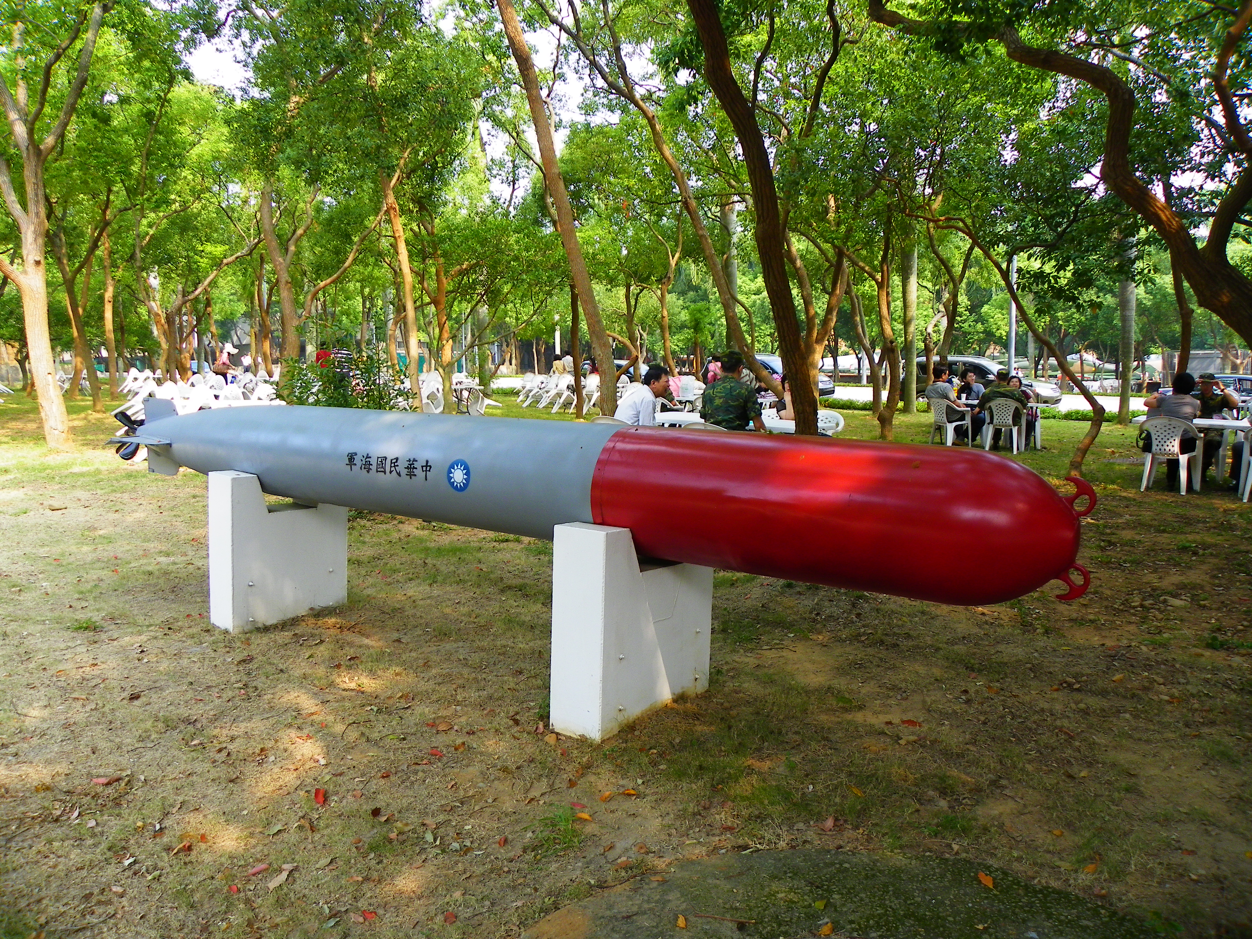 成功嶺展示的日本海軍九一式航空魚雷，中國抗日戰爭勝利後殘存於臺灣的庫存為我中華民國海軍接收，轉用為艦載武器，並有自日本輸入的紀錄。原置於三軍大學率真營區，1997年移設至此。